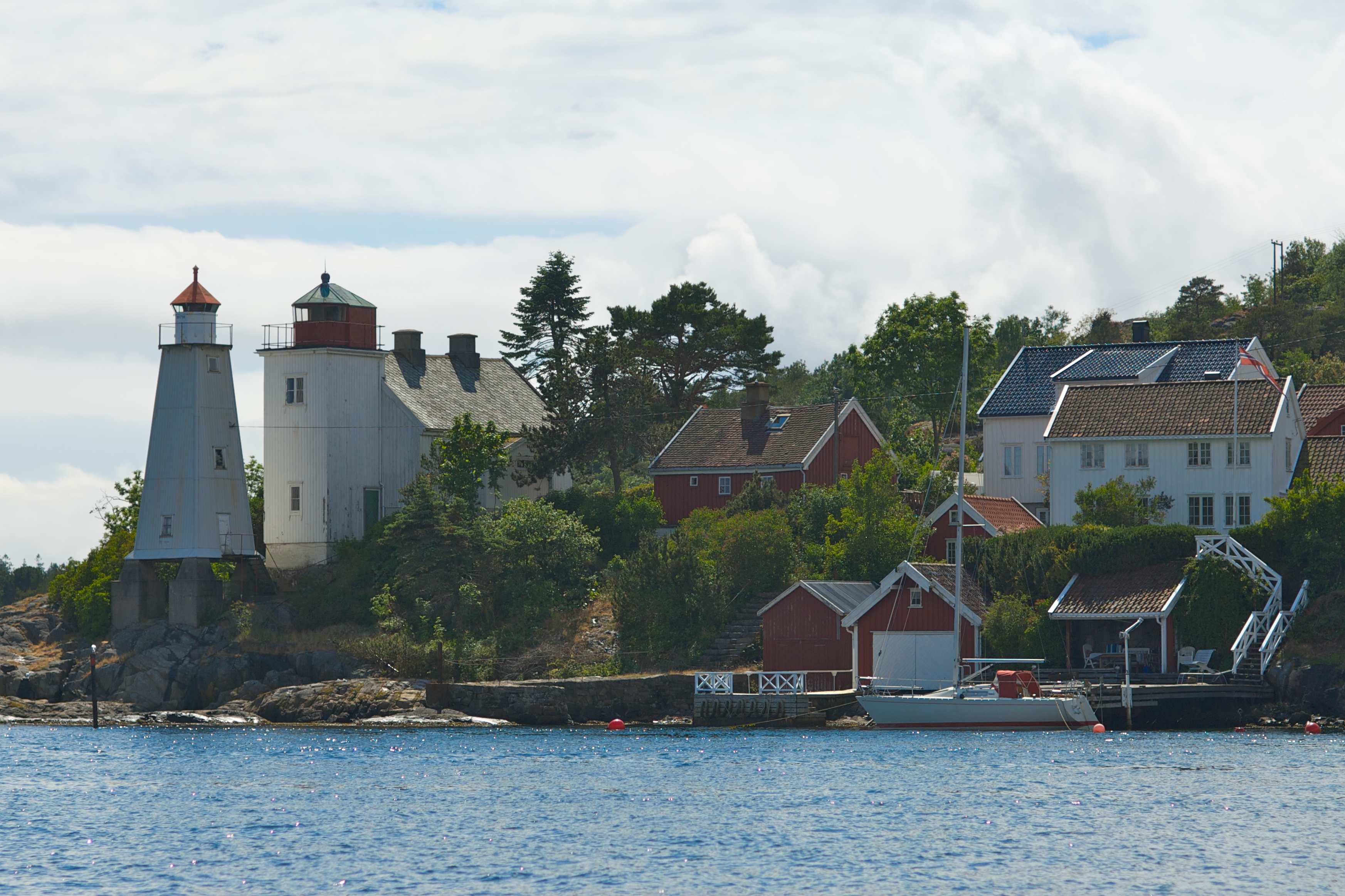 Sandvikodden lighthouse